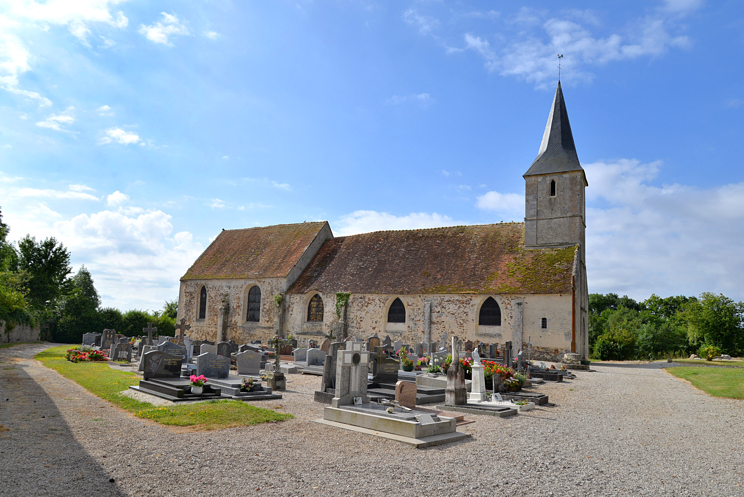 Villedieu-lès-Bailleul (Orne)